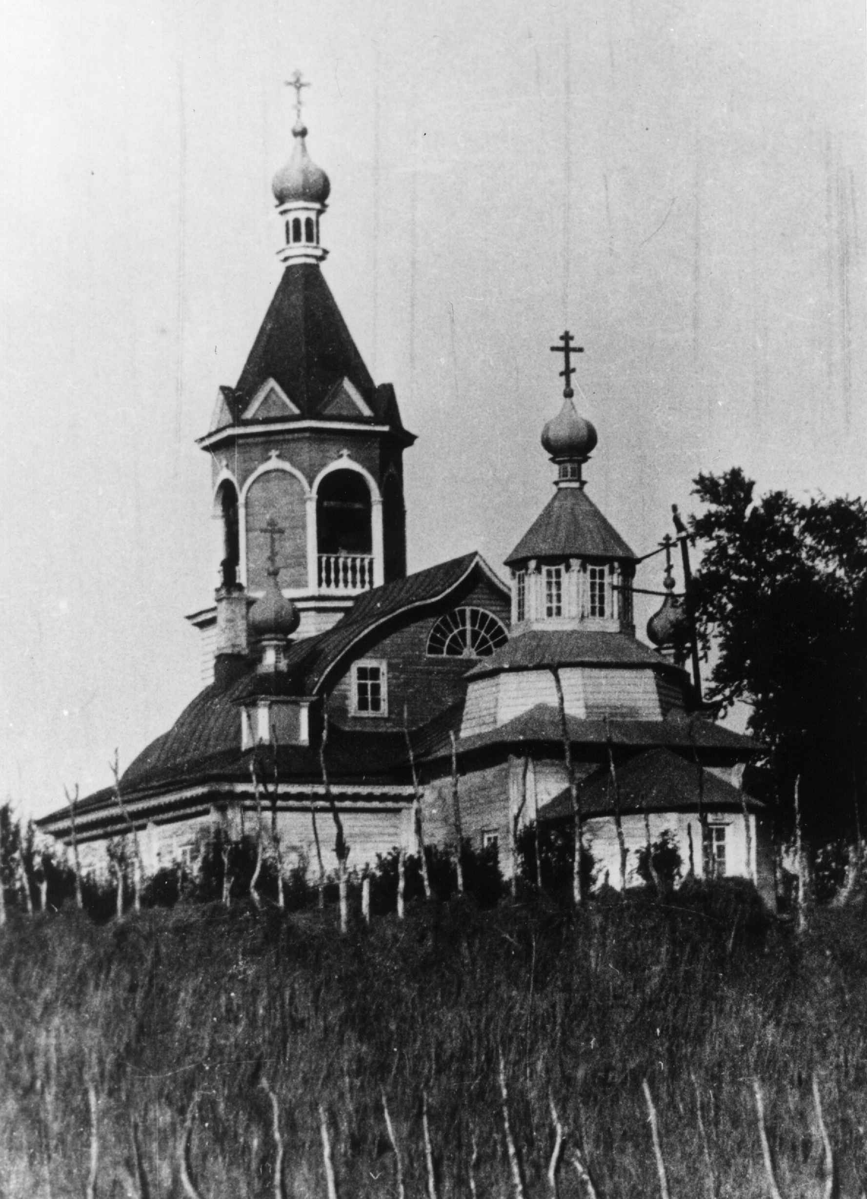 Klosterkirken i Petsjenga (Petsamo). Russland.